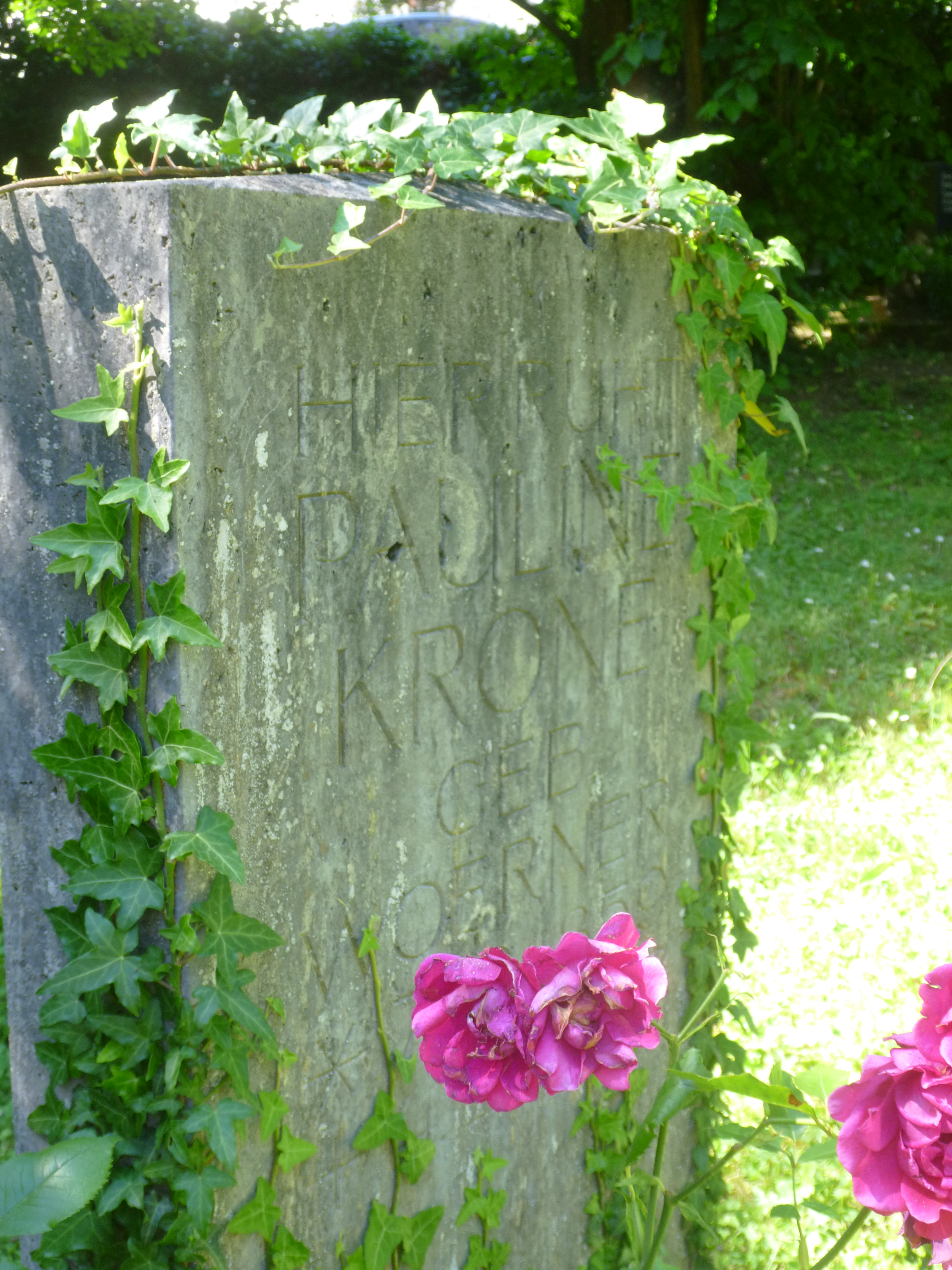 Pauline Krones Grab auf dem Stadtfriedhof Tübingen